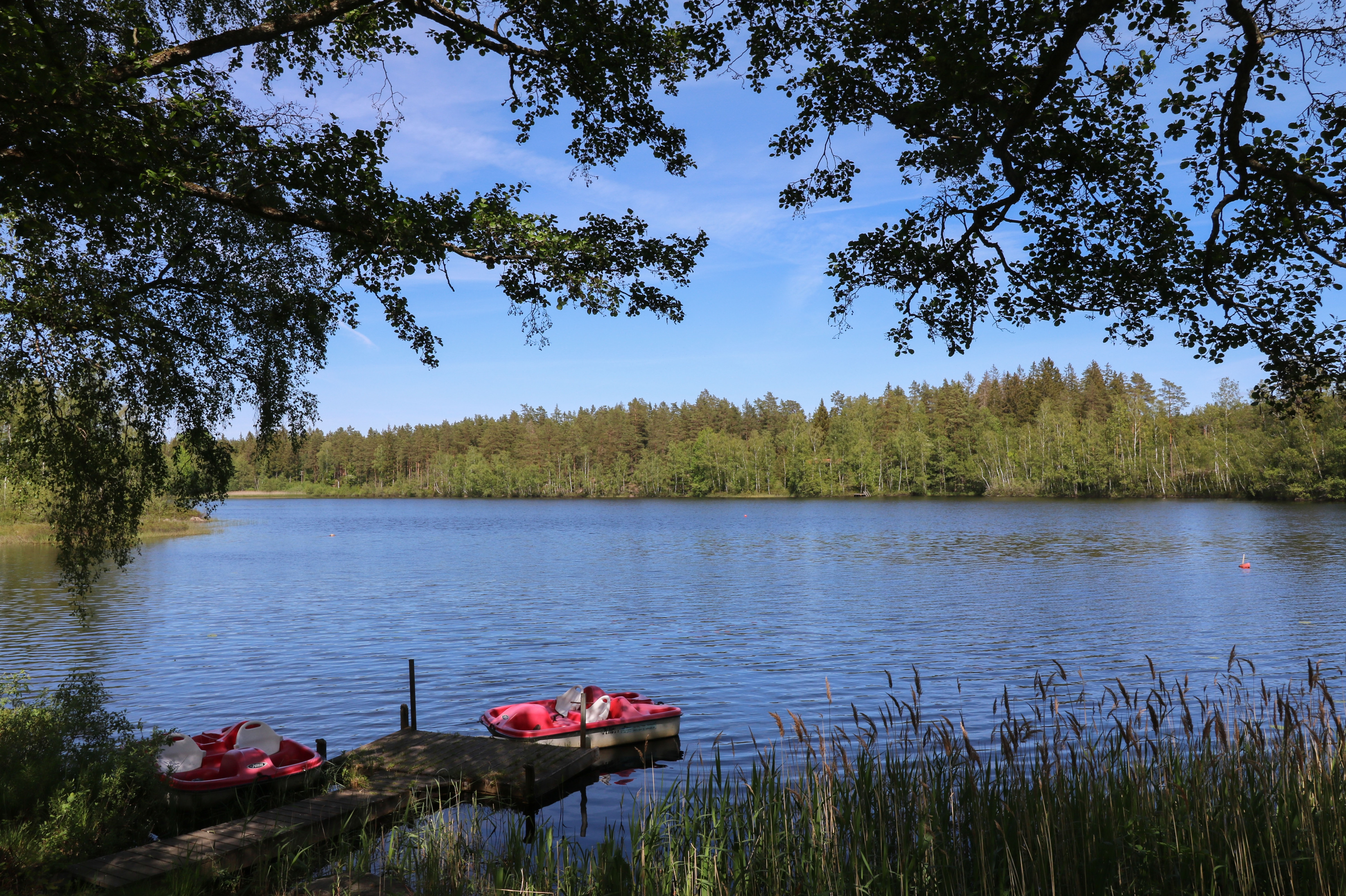 Ödevaten är en sjö i Emmaboda kommun i Småland.